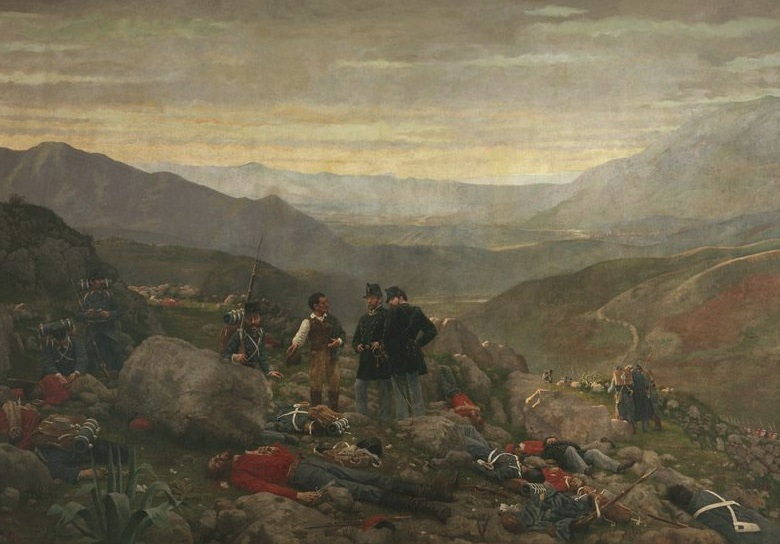 Reggia di Caserta